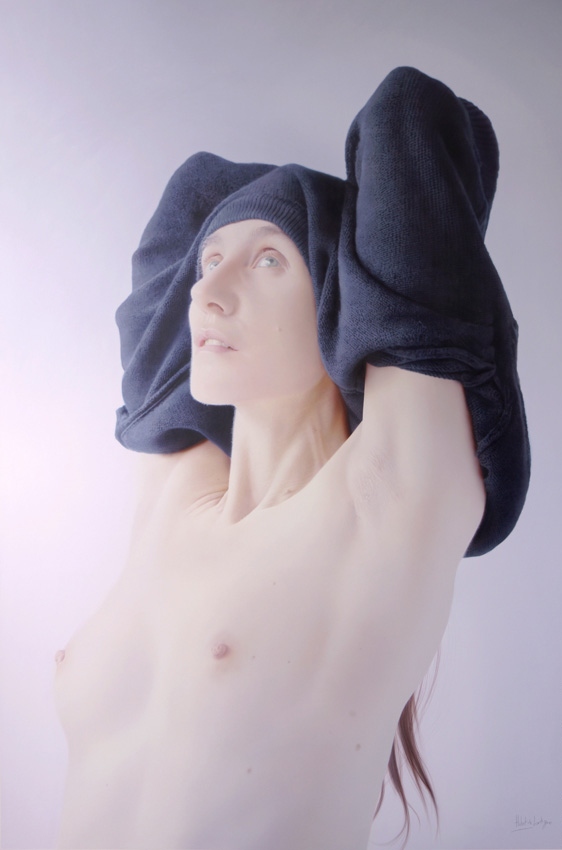 Mika'Ela - © Hubert de Lartigue - décembre 2012 - Acrylique sur toile / 130 x 89 cm (acrylics on canvas / 51.18 x 35.03 inches)